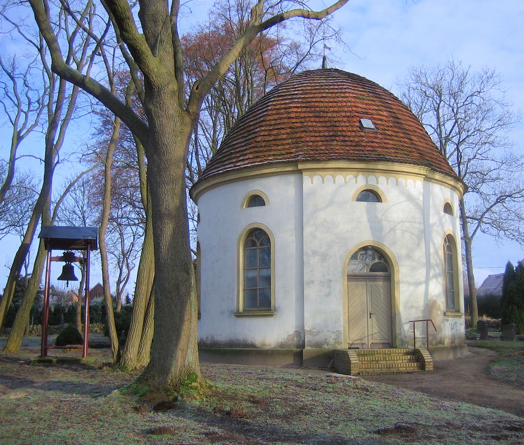 Dorfkirche Gramelow, Ortsteil von Burg Stargard, Landkreis Mecklenburg-Strelitz